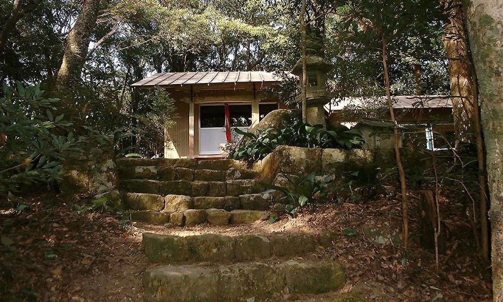 四十寺は山頂にある